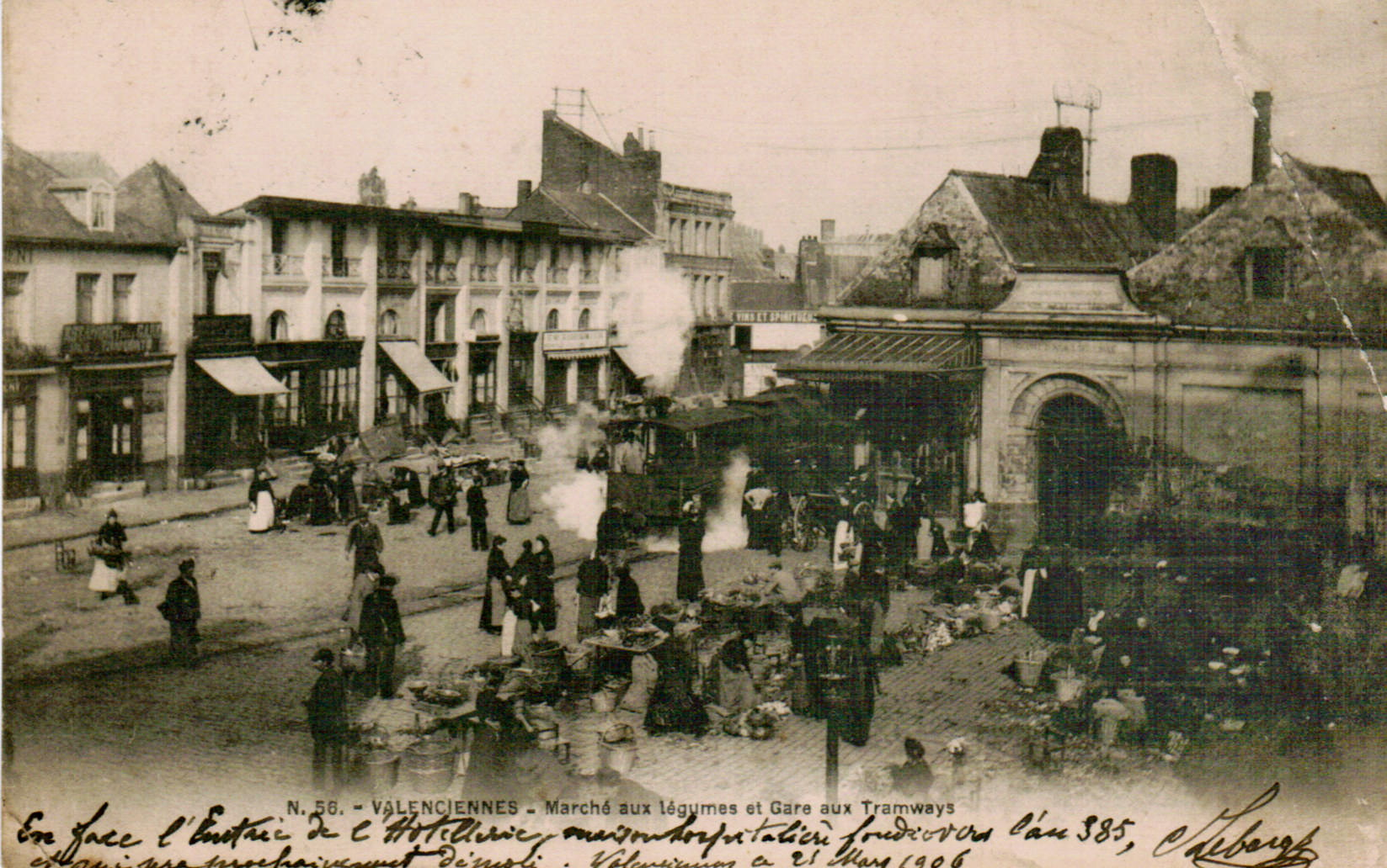 Carte postale ancienne sans mention d'éditeur, n°56Valenciennes : Marché aux légumes et Gare aux Tramways